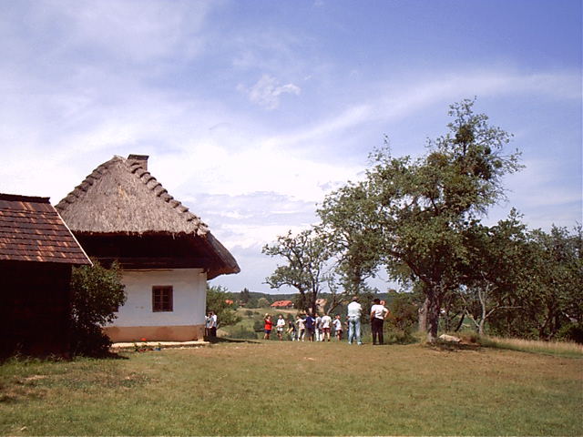 Szabadtéri skanzen az Őrségben (Pityerszer)